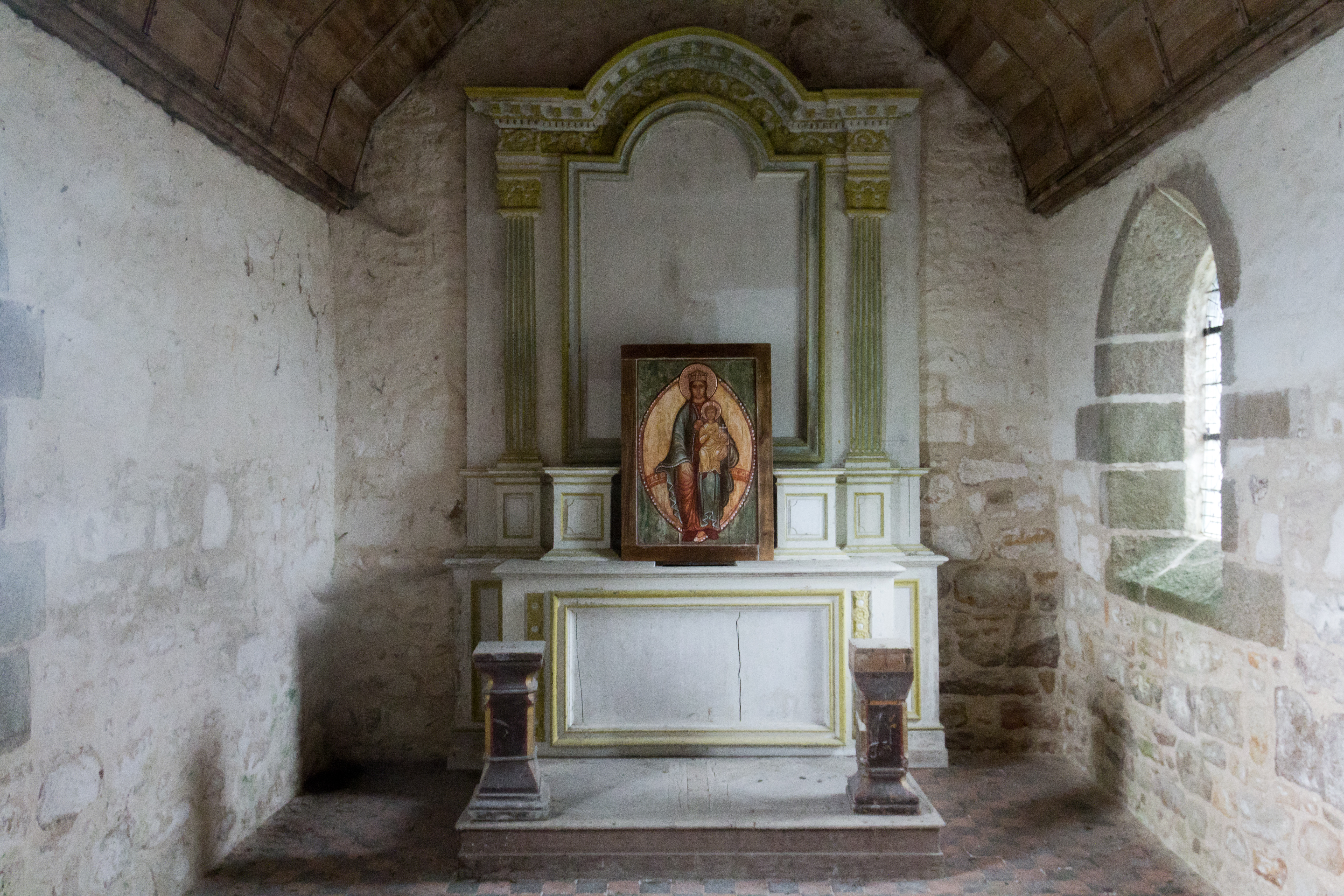 Un retable en bois peint sculpté est adossé au mur nord de la chapelle. Y est posé un tableau de la Vierge à l'enfant. .